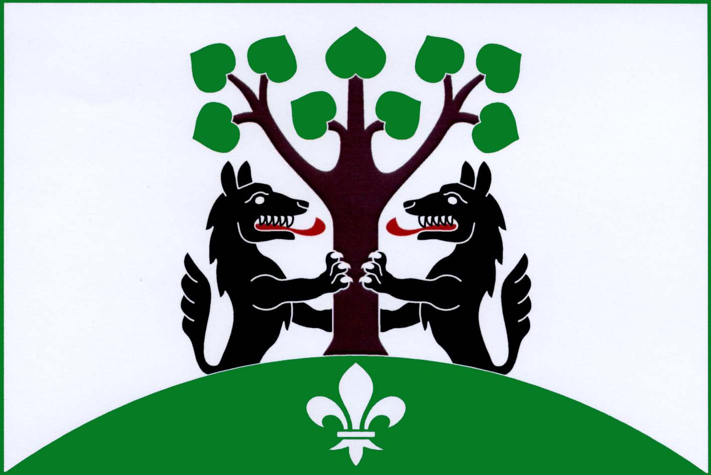 Česky: vlajka obce Vlčkovice v Podkrkonoší